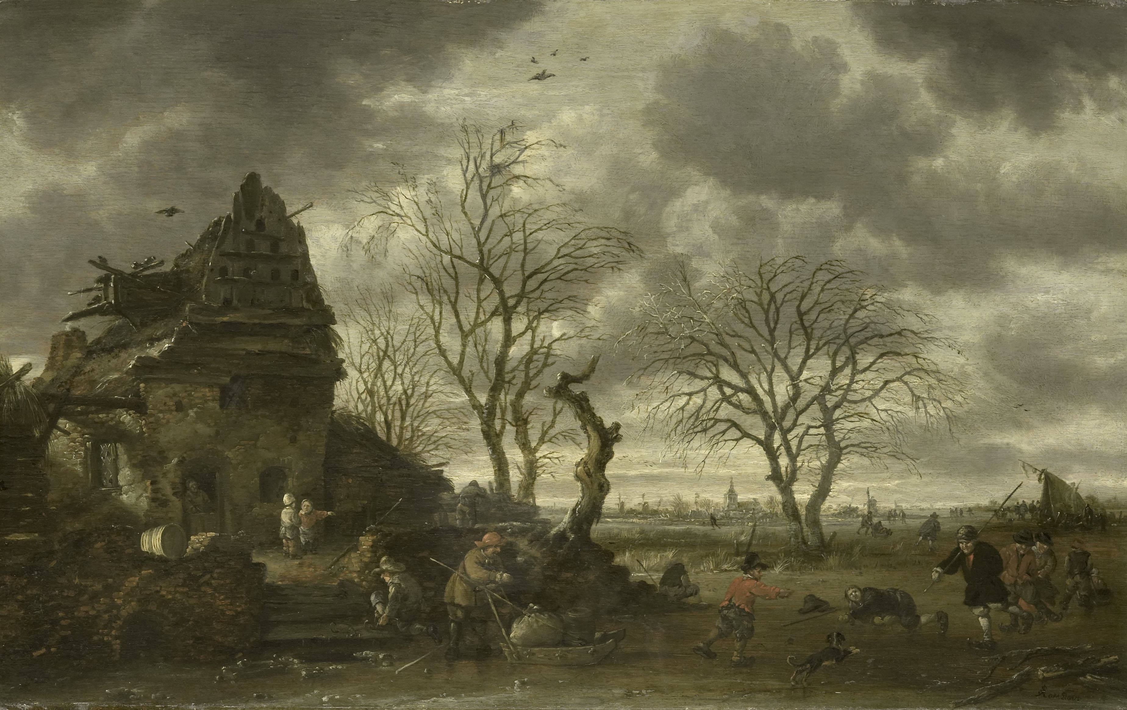 Wintergezicht. Winterlandschap met rechts schaatsers op het ijs en links een oude vervallen boerenwoning met duiventil. In de verte een tent en het profiel van een dorpje.